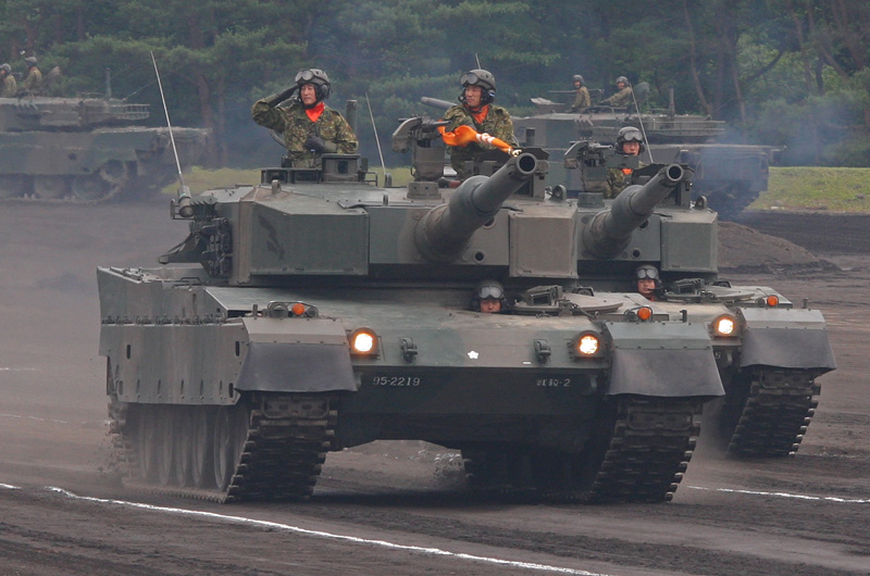 記念式典にて敬礼を行う戦車教導隊長